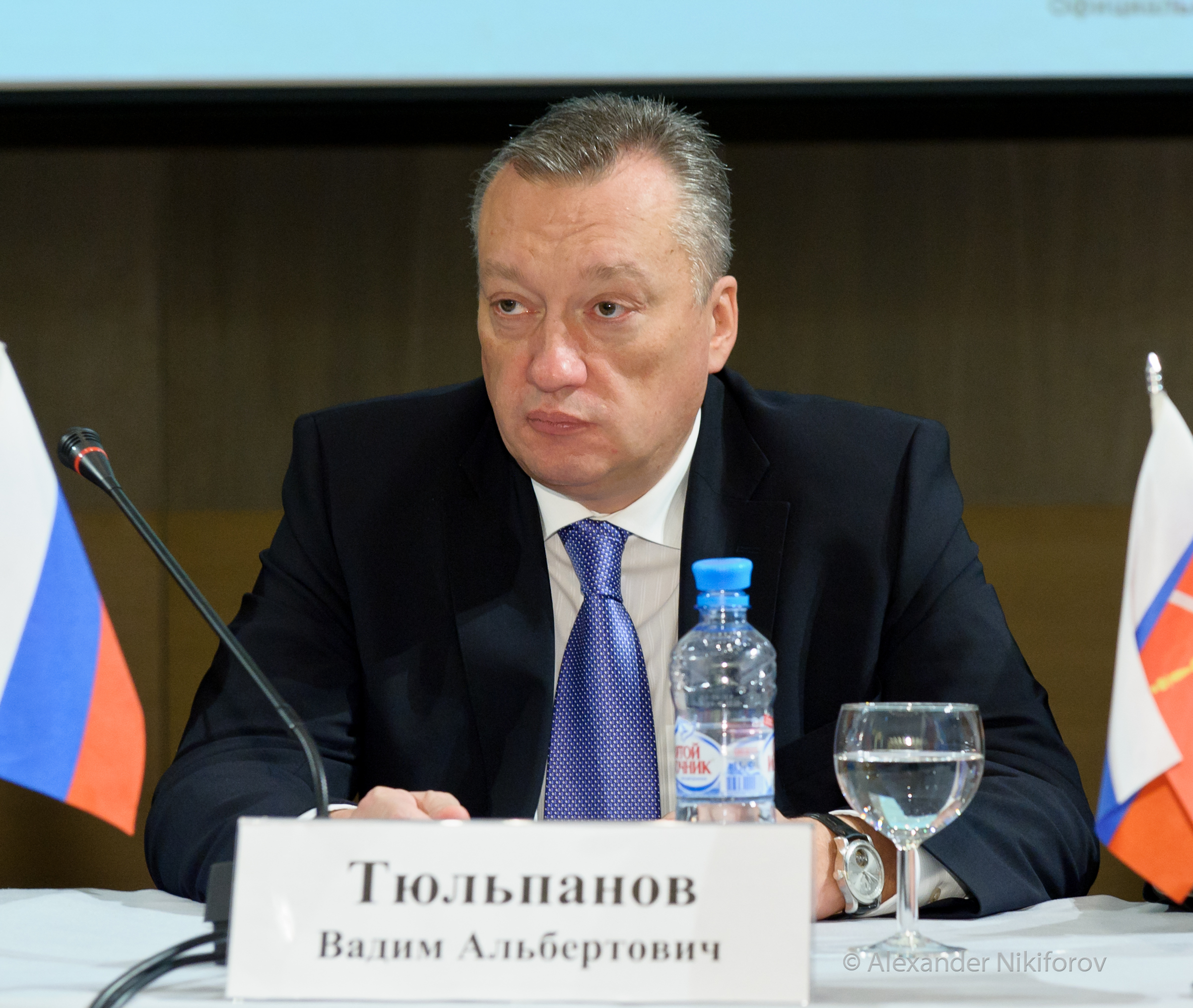 Вадим Альбертович Тюльпанов — российский государственный деятель